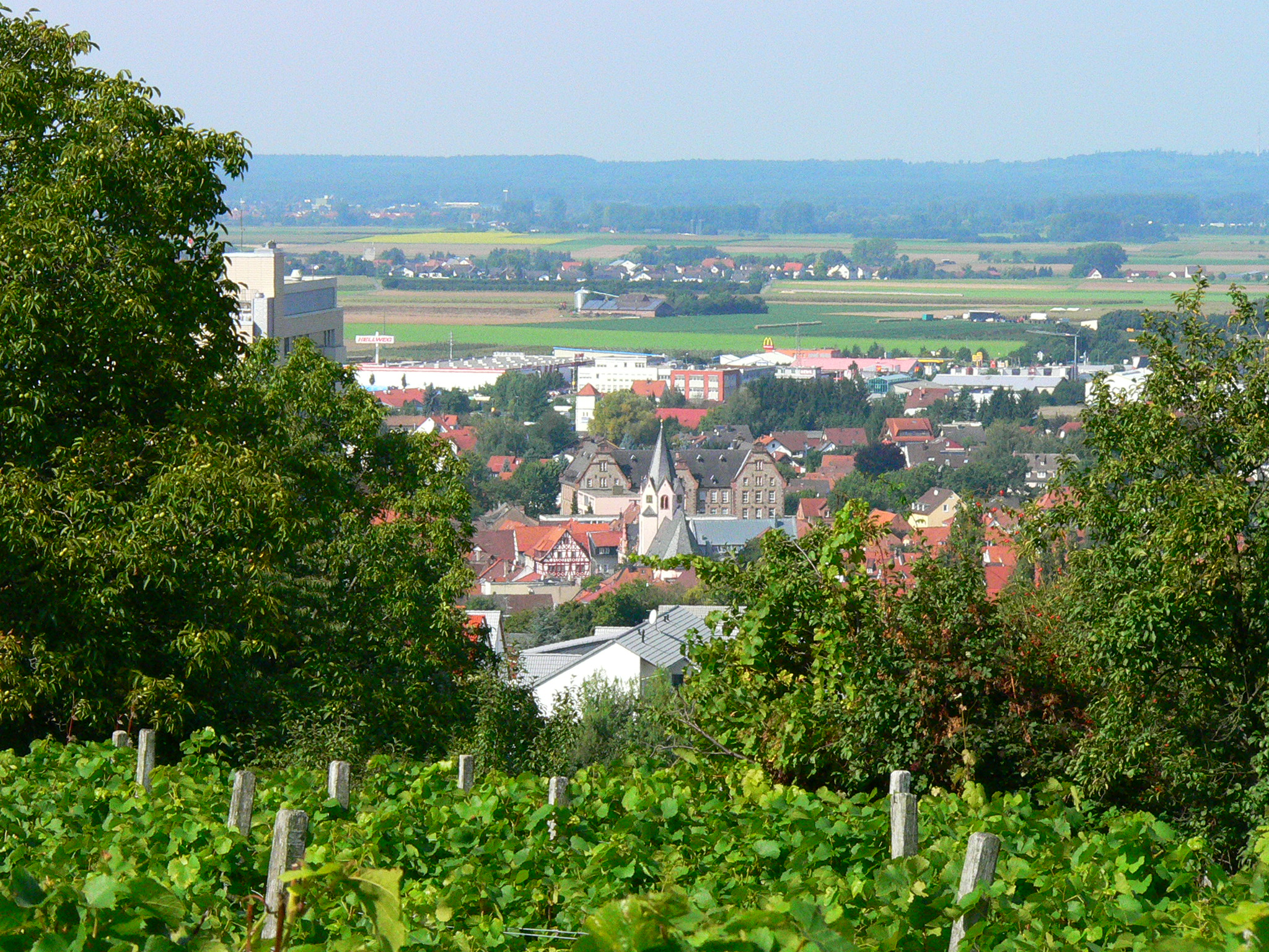 Ansicht von Groß-Umstadt, Odenwald, Deutschland. Im Vordergrund Weinberg.